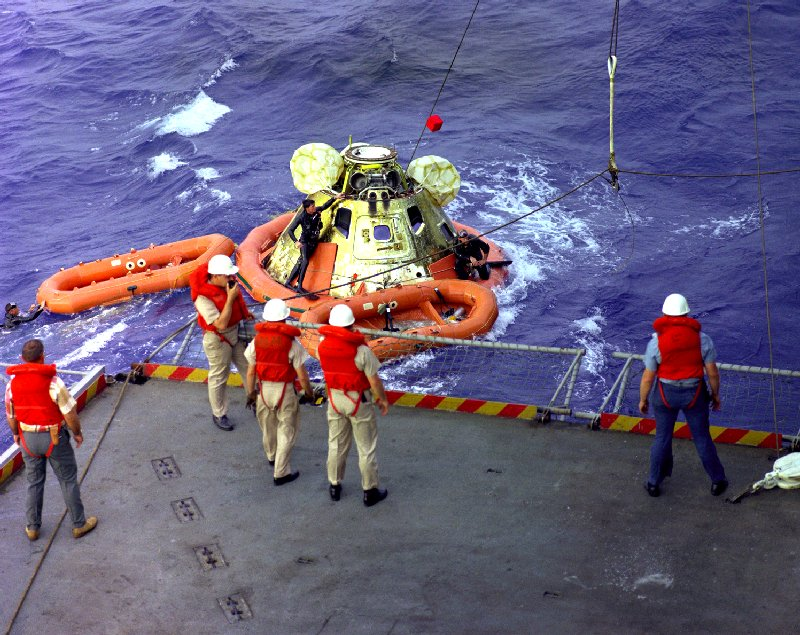 Apollo 8 - Die Kapsel wird an Bord der USS Yorktown (CV-10) gehoben